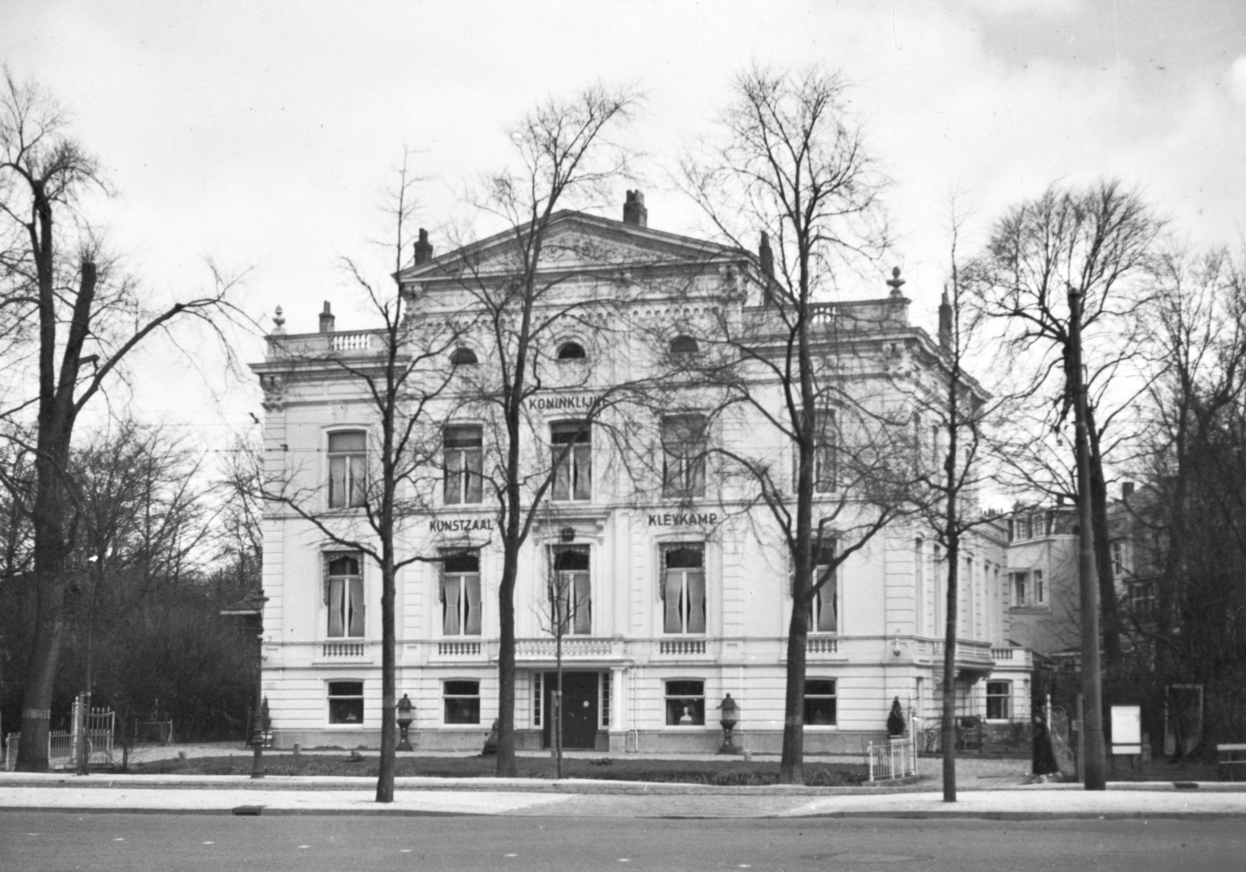 Scheveningseweg 17, Den Haag, Koninklijke Kunstzaal Kleykamp, sinds 1940/41 Rijksinspectie der Bevolkingsregisters, door Engelsen gebombardeerd op 11-4-1944, vele doden